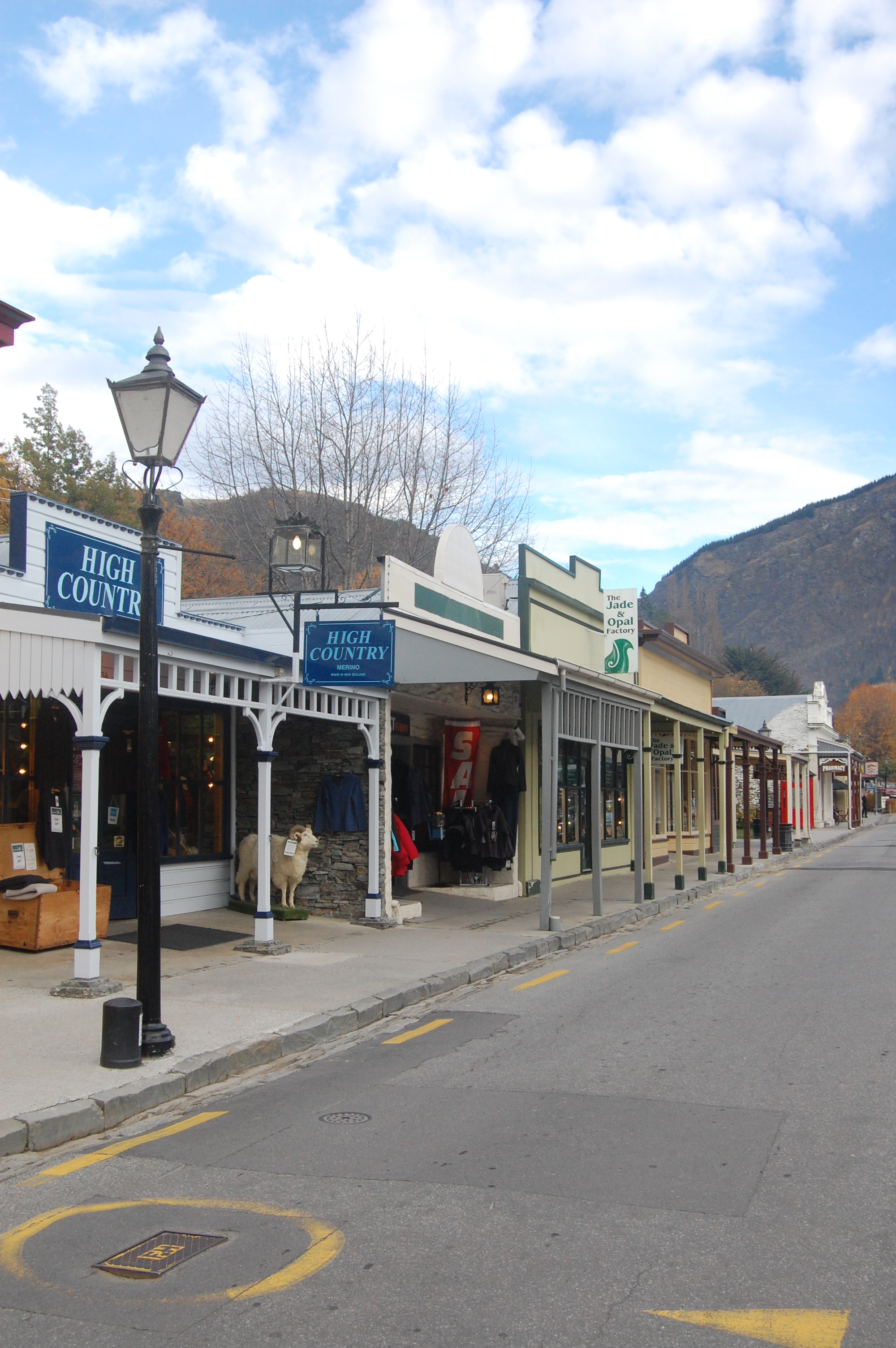 Arrowtown